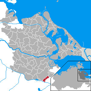 Wietstock, Landkreis Ostvorpommern, Mecklenburg-Vorpommern